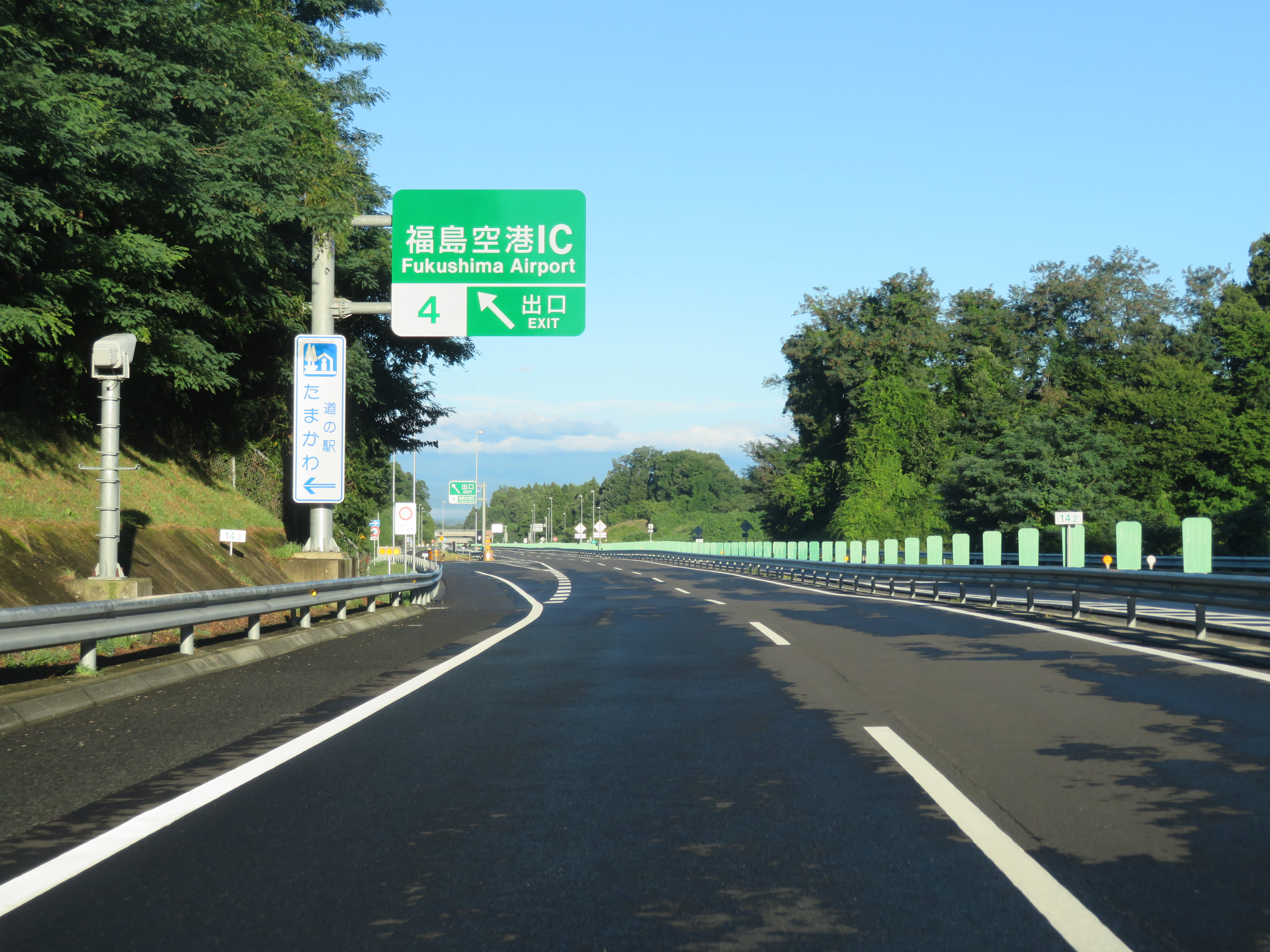 あぶくま高原道路福島空港ＩＣ出口付近（矢吹ＩＣ方面を撮影） Canon PowerShot SX720 HS